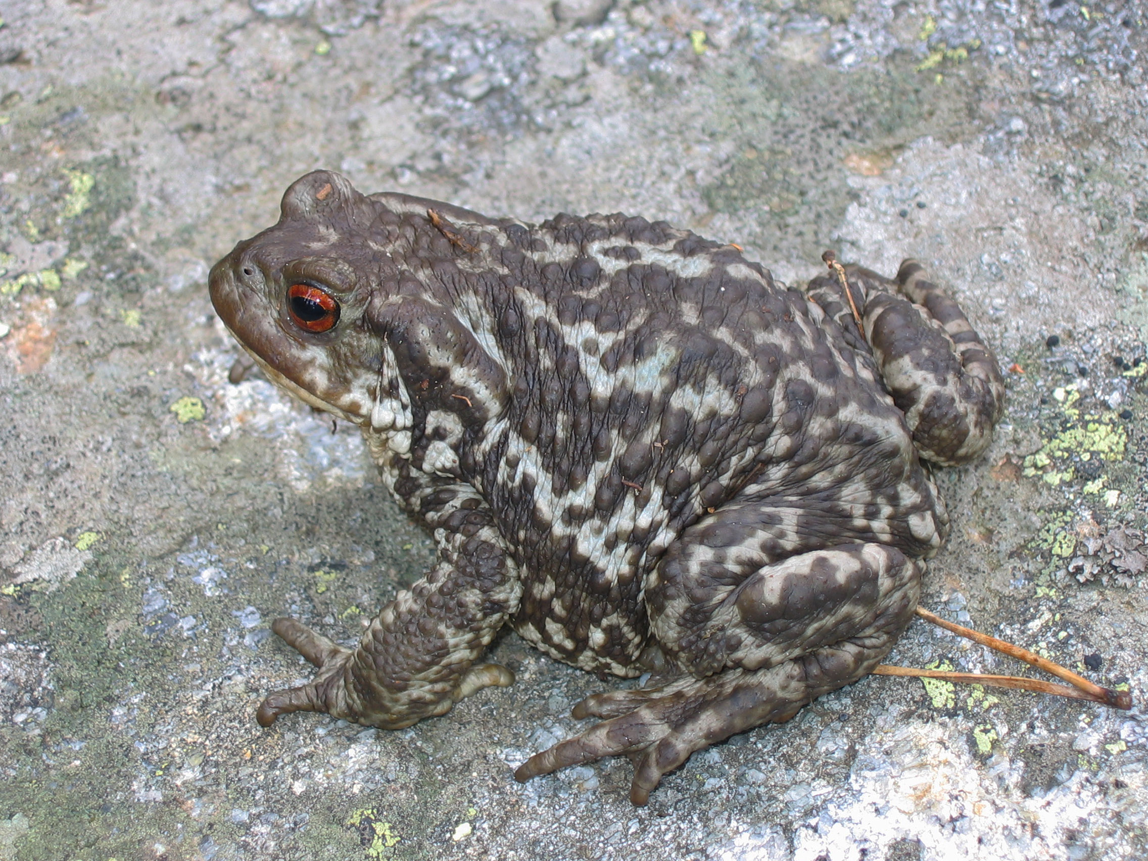 Bufo bufo spinosus (Pyrénées Orientales 66)